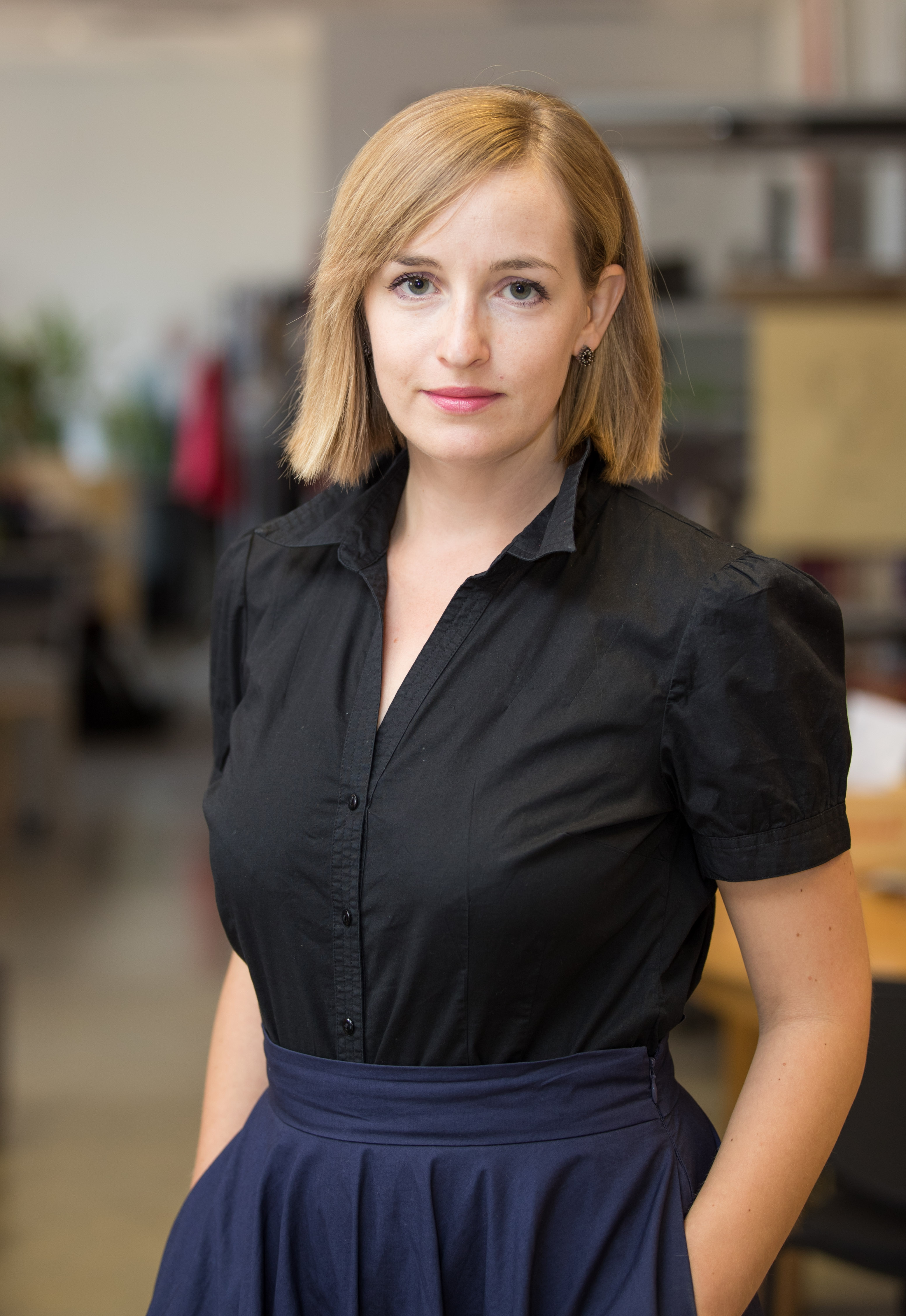 Maria Ulfsak-Šeripova